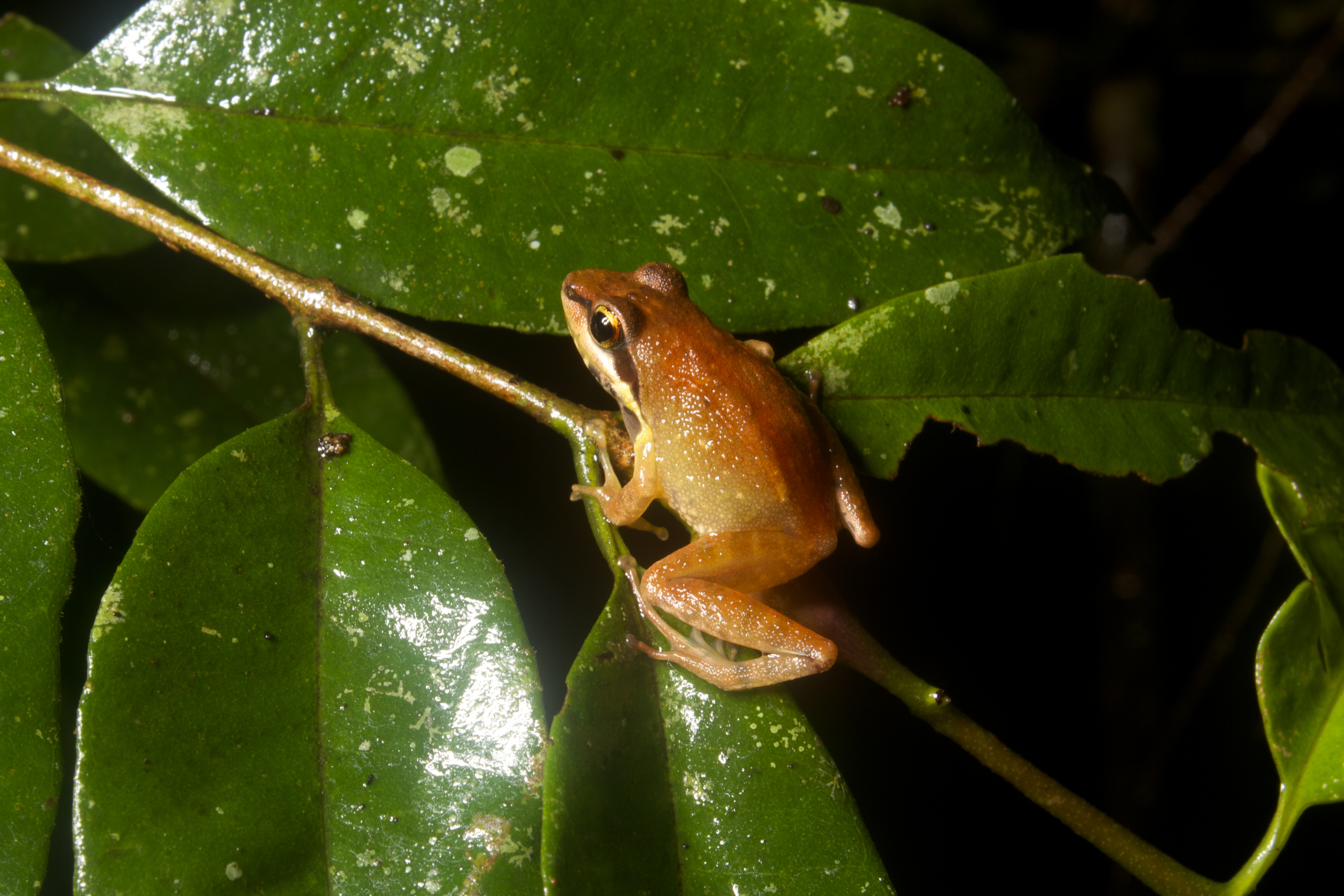 Gephyromantis enki